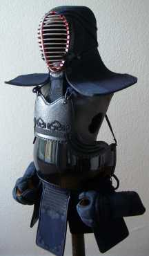 Bogu for Kendo